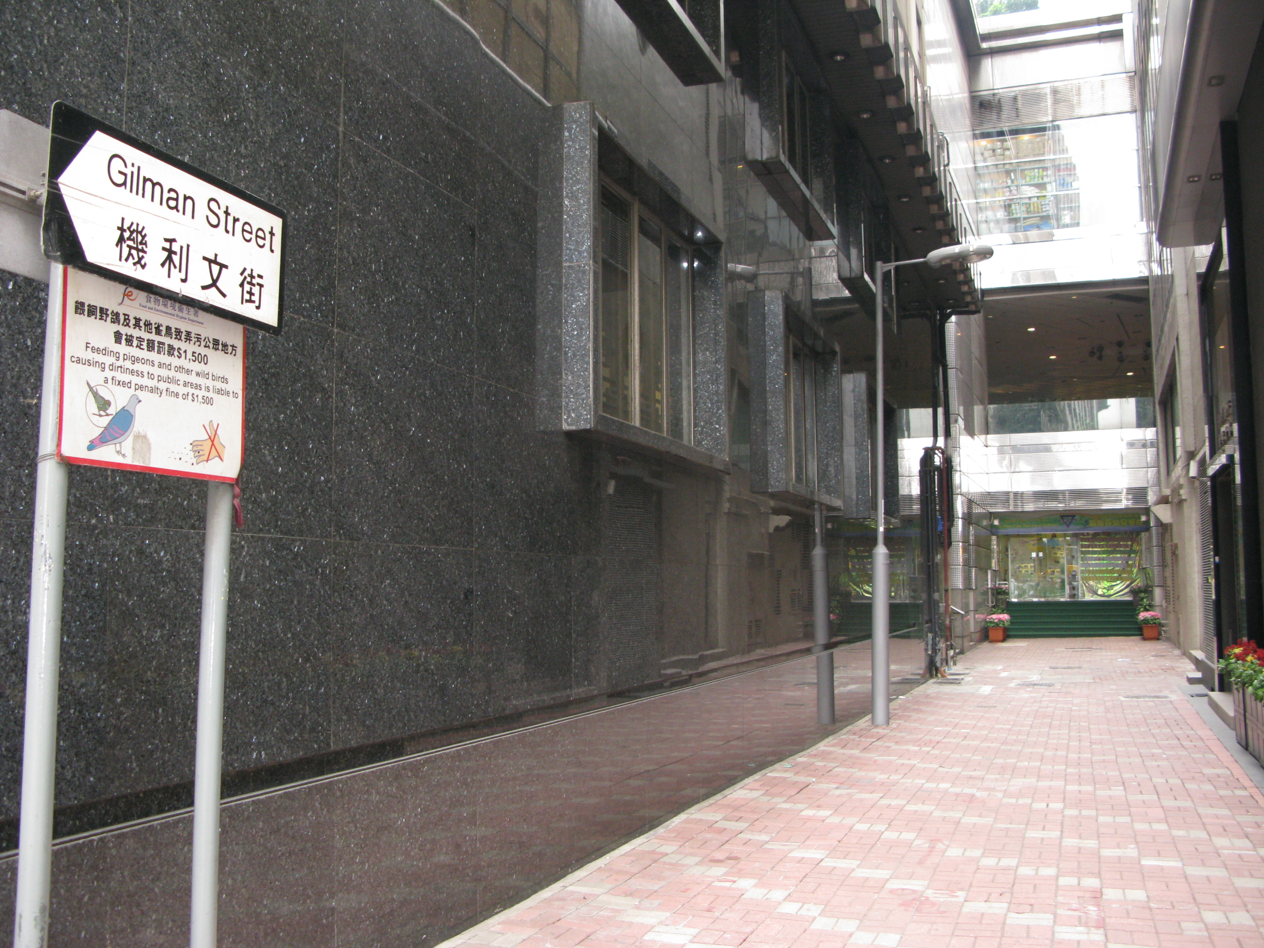 中文（香港）: 香港中環機利文街南段掘頭路